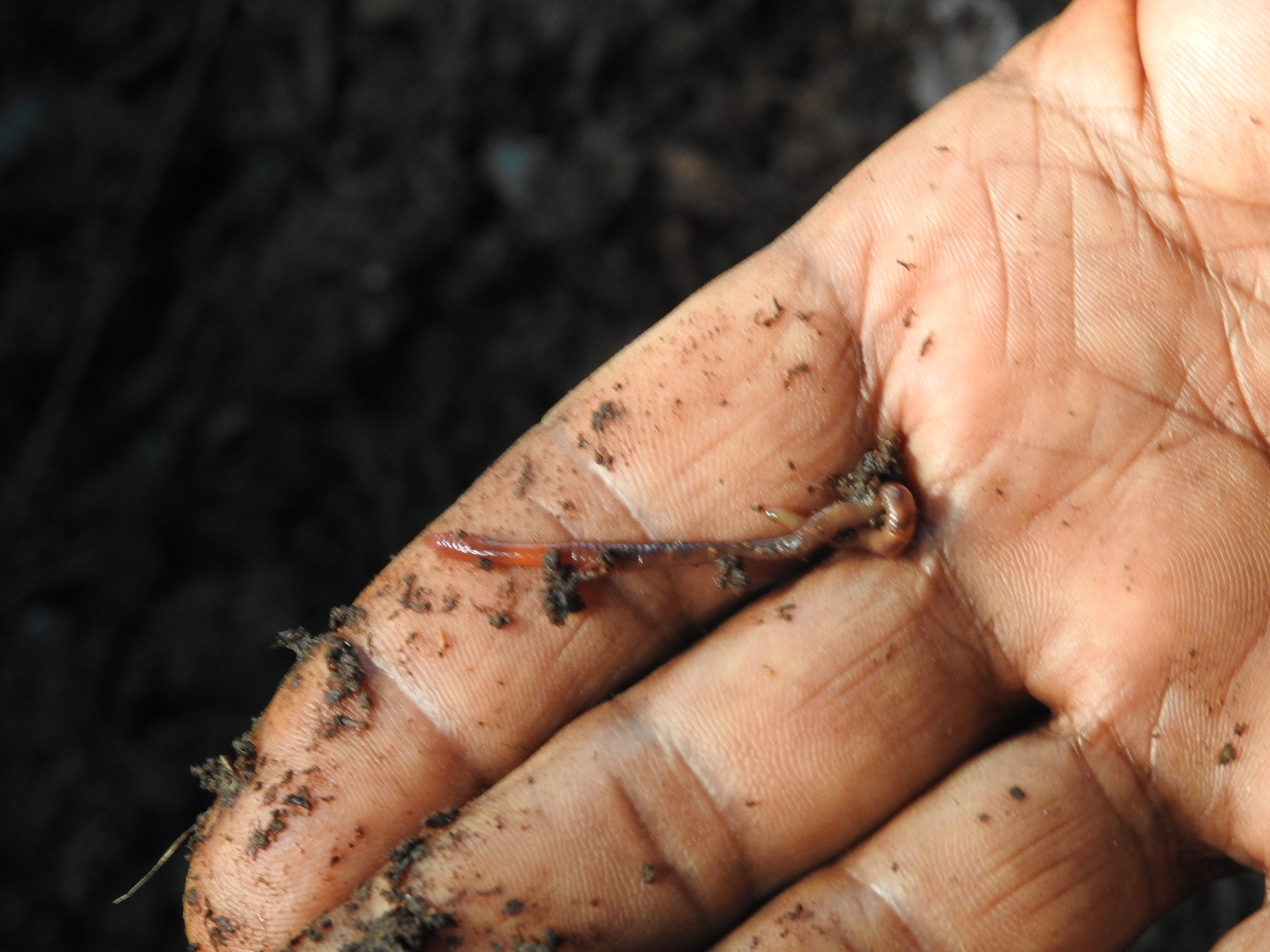 മണ്ണിരക്കമ്പോസ്റ്റ്